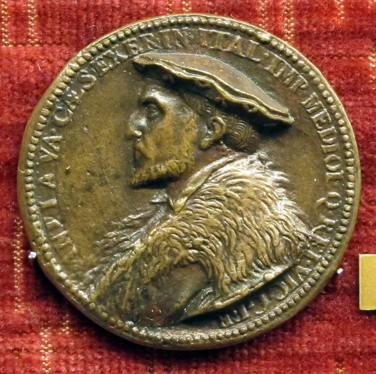 Antonio de Leyva (1480-1536), medaglia di autore anonimo